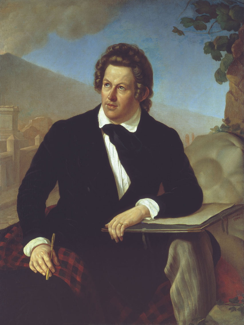 Портрет художника Карла Павловича Брюллова Материал: Холст, масло